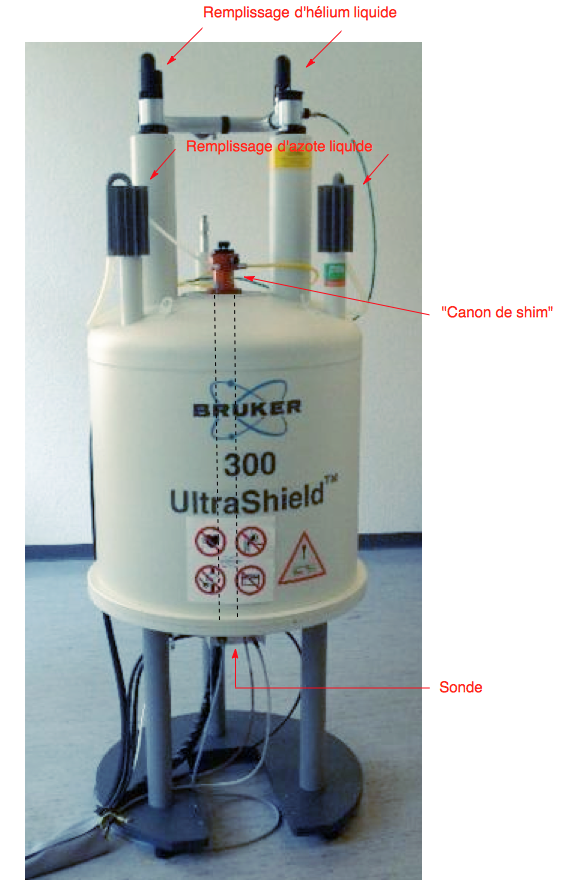 Description d'un spectromètre RMN. Basé sur NMR-Spectrometer.png, Ewen's edited version of photo by Andel Früh & Andreas Maccagnan